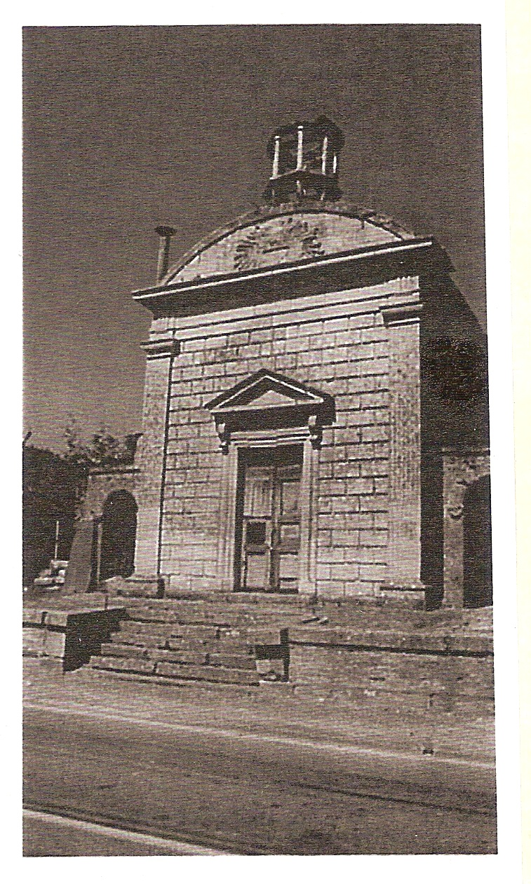 Photographie personnelle argentique scannée de la "Chapelle" de Morvillers